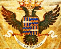 Fürstlichen Wappen der Landi, Principi di Val di Taro